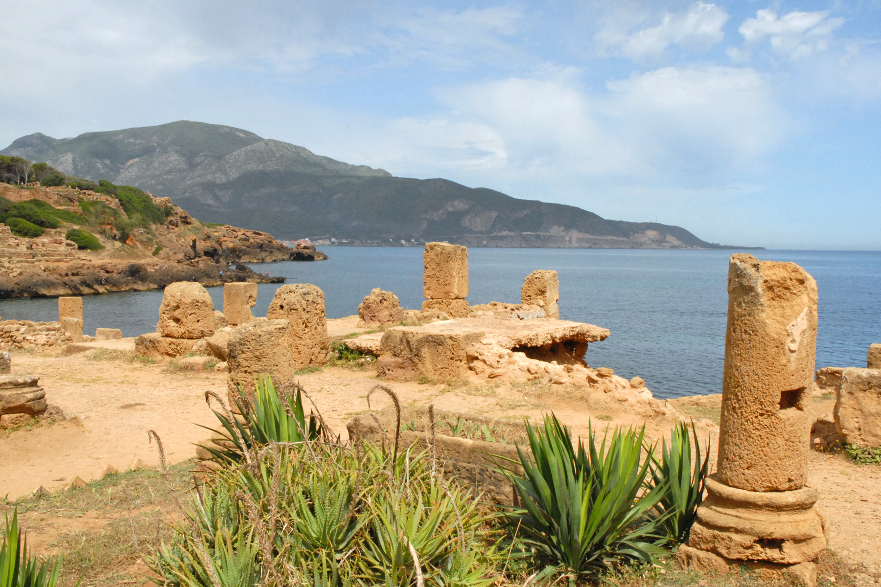 Les Phéniciens ont fondé à Tipaza un comptoir vers le Ve siècle av. J.-C. : c'est de cette origine que la ville tire son nom qui signifie « lieu de passage » ou « escale ». La ville connaît son essor sous le roi numide Juba II et devient avec Caesaria (actuelle Cherchell) l'un des foyers de la culture gréco-romaine en Afrique du Nord. Tipaza avait alors le type de la ville punique car elle se situait dans l'aire d'influence de Carthage. Sous l'empereur romain Claude Ier, en 39, Tipaza prend le statut de municipe latin et se dote d'une muraille longue de plus de deux kilomètres. Hadrien éleva par la suite Tipaza au rang de colonie honoraire. À la fin du IIe siècle, la ville connaît son apogée avec une population qui s'élève, selon les estimations de Stéphane Gsell, a 20 000 habitants. Au deuxième siècle, cette cité romanisée s’agrandit vers l’ouest au dépend d’une ancienne nécropole punique. Bien qu’elle était entourée d’une longue muraille de 2 km cela n’a pas empêché sa destruction en l’an 430 par les Vandales menés par Genséric (Wikipedia) Tipaza est un site inscrit au Patrimoine mondial de l'UNESCO en 1982.